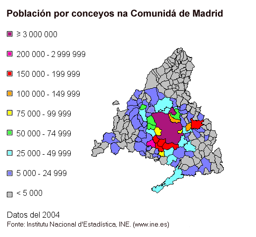 Población de la comunidá de Madrid por conceyos (ast)